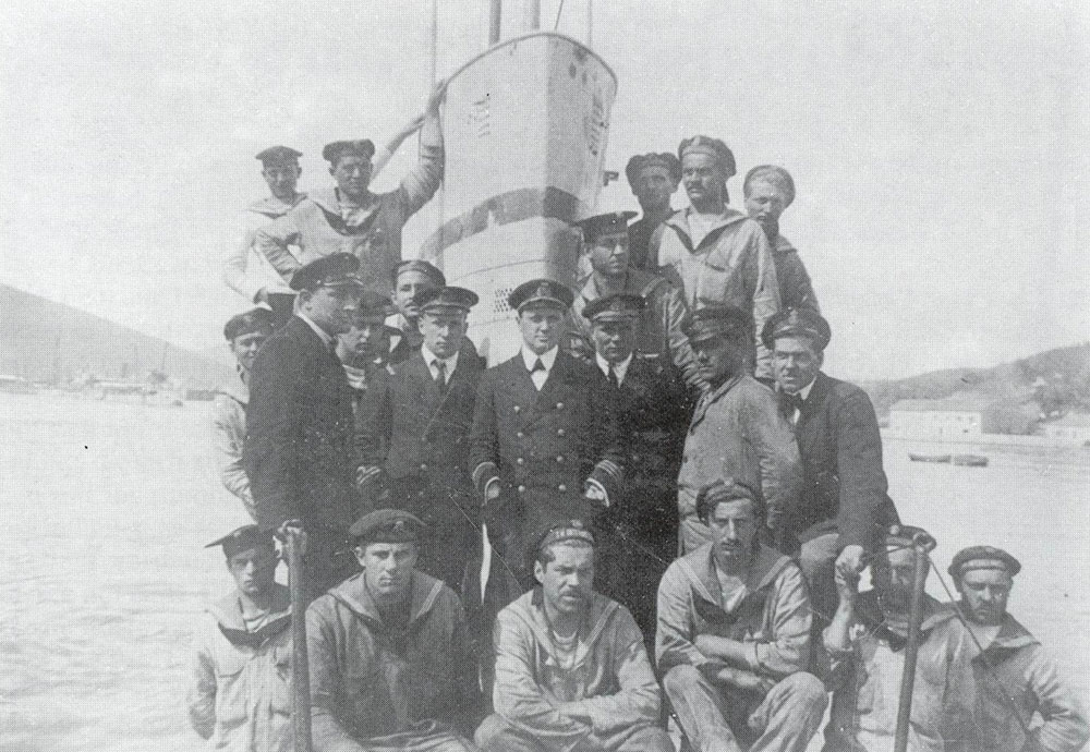 SMU-6 Gruppenfoto der Besatzung nach der Versenkung des Zerstörers Renaudin